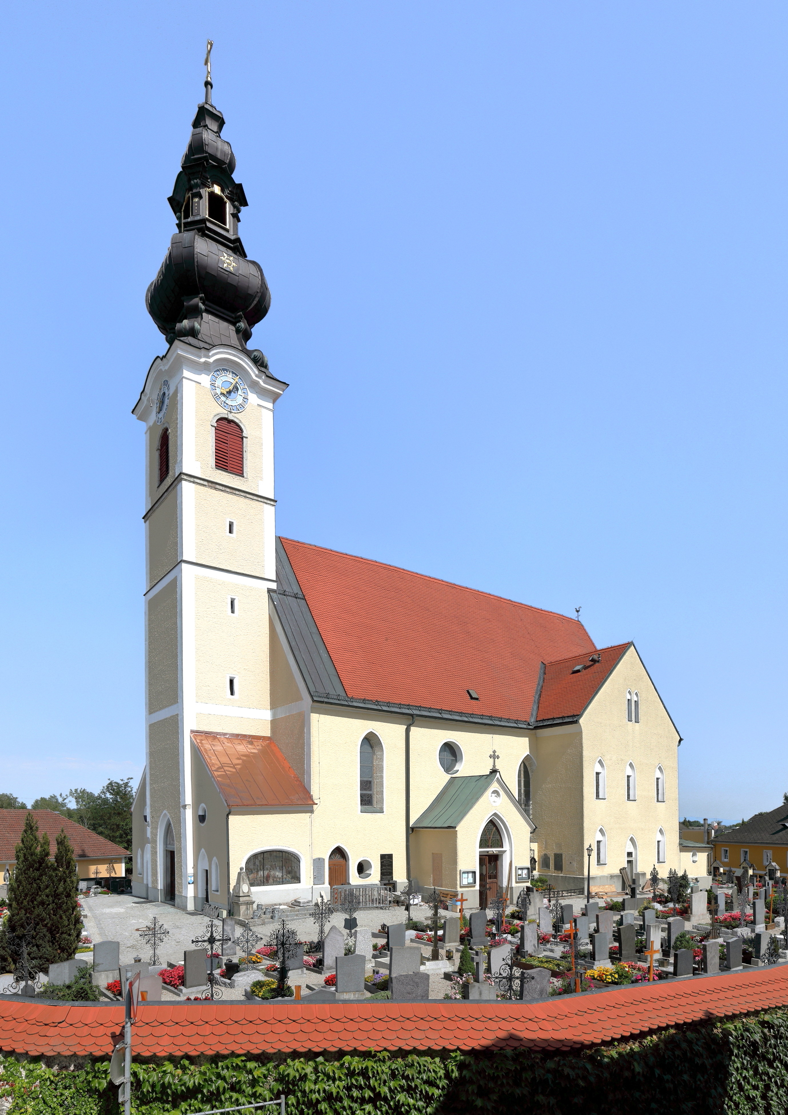 Südwestansicht der röm.-kath. Pfarrkirche hl. Martin in der oberösterreichischen Marktgemeinde Gunskirchen.Die von einem Friedhof umgebene Kirche wurde in mehreren Etappen ab der Mitte des 15. Jahrhunderts bis Anfang des 16. Jahrhunderts errichtet. Im 18. Jahrhundert erfolgte die Barockisierung der Einrichtung, die später teilweise wieder rückgängig gemacht wurde.